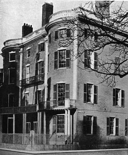 Boston, Massachusetts